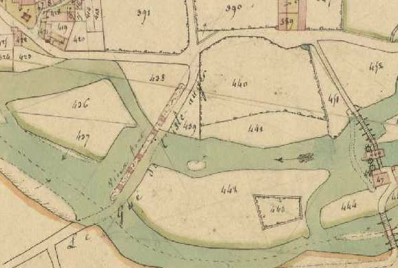 extrait du cadastre napoléonien de Chambourg-sur-Indre, section l'Île Auger B2